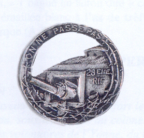 insigne régimentaire du 28e RIF